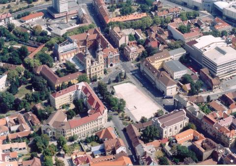 Miskolc, downtown, aerial photography